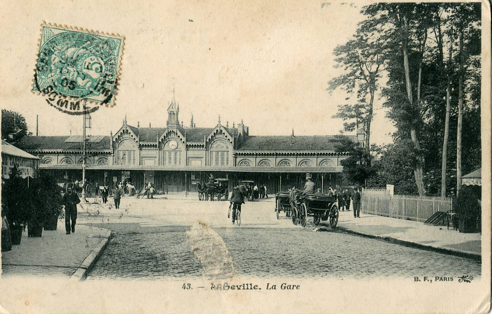 Carte postale ancienne éditée par BF à Paris, N° 43 Abbeville : La Gare